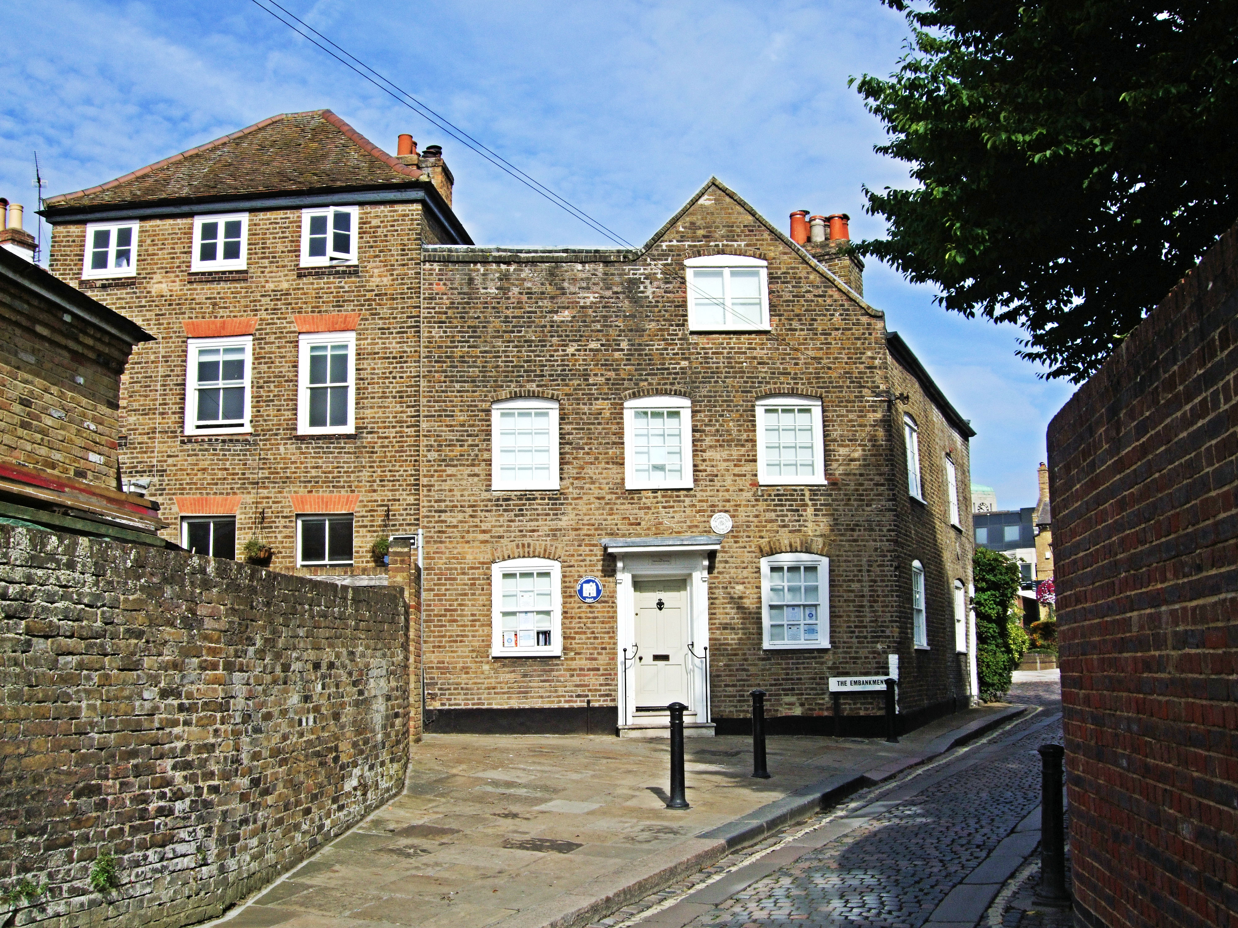 Twickenham Museum - London.